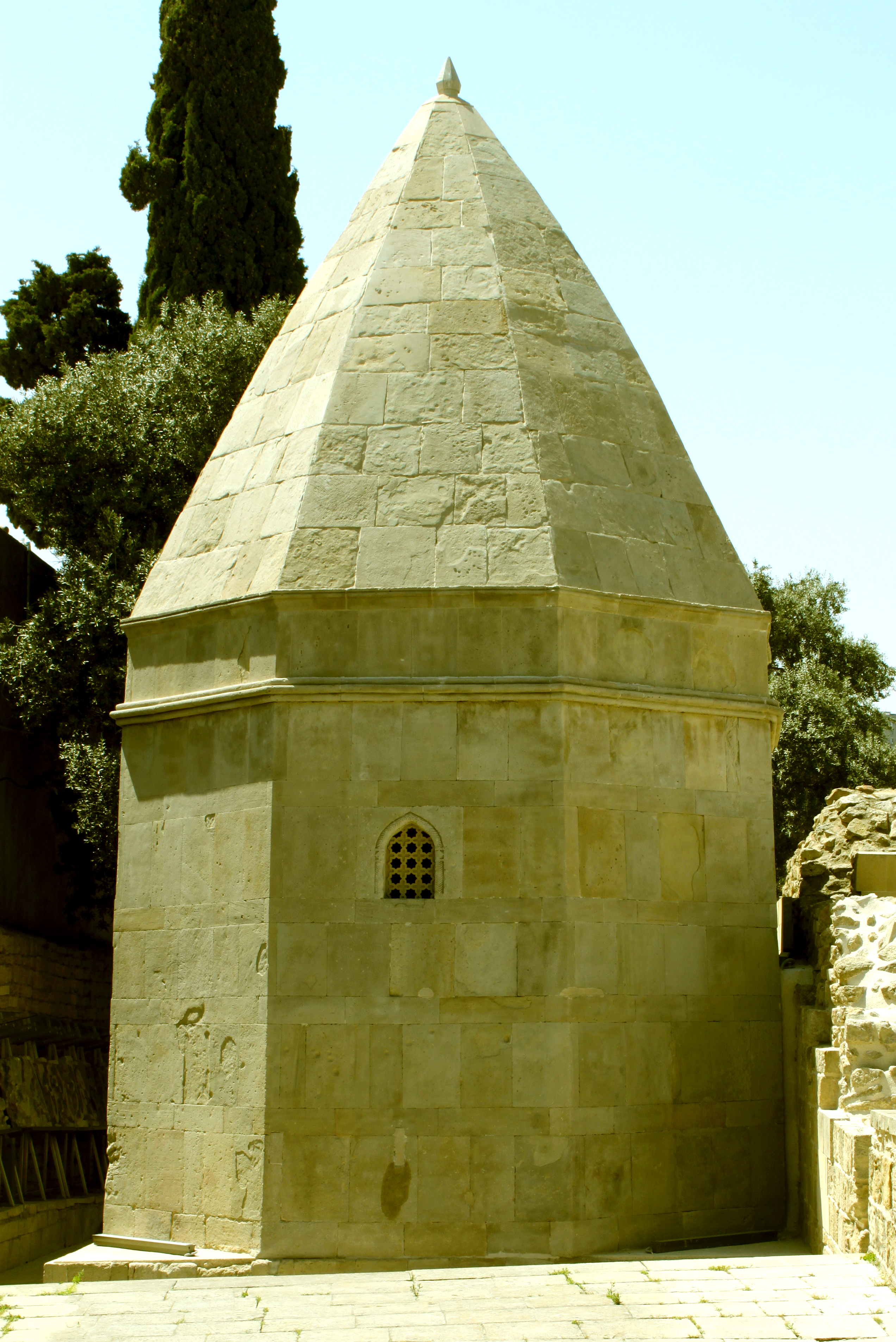 Seyid Yəhya Bakuvinin türbəsi